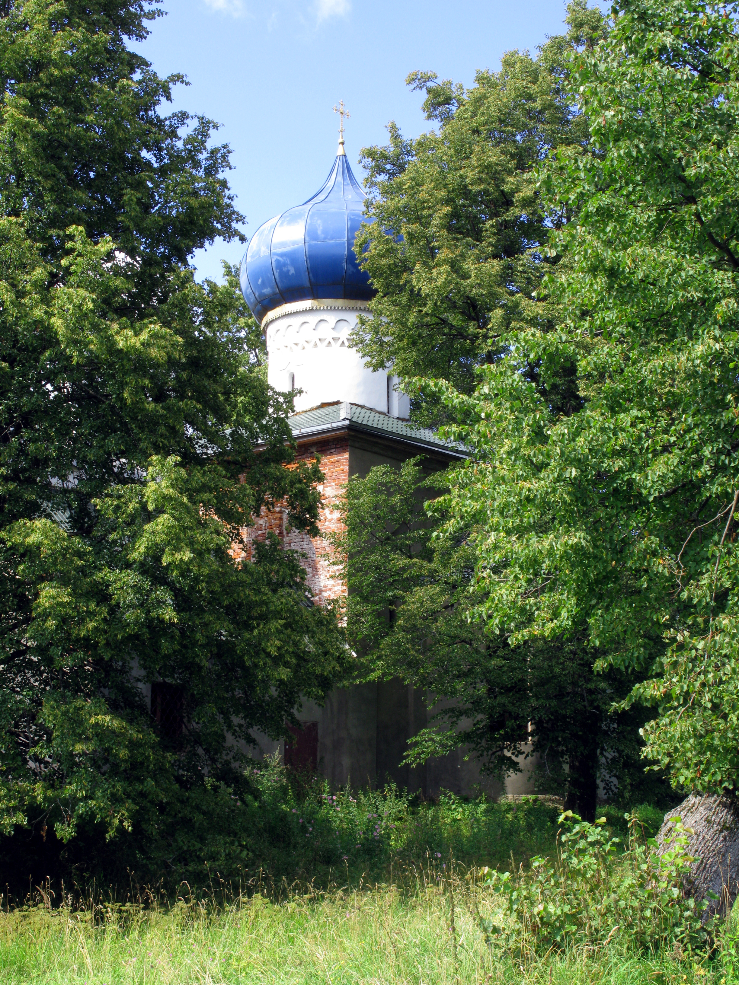 Церковь Олега Брянского в селе Осташёво (Волоколамский район Московской области).